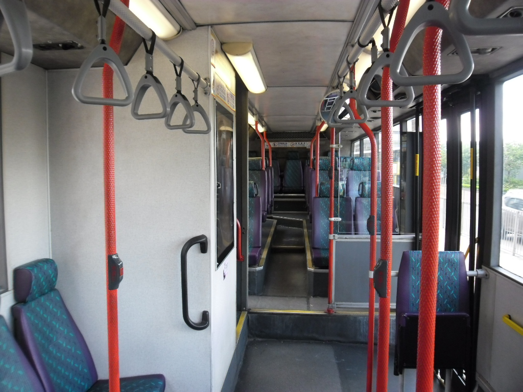 中文（香港）: 城巴1997年MAN 24.350（2500）之下層車廂